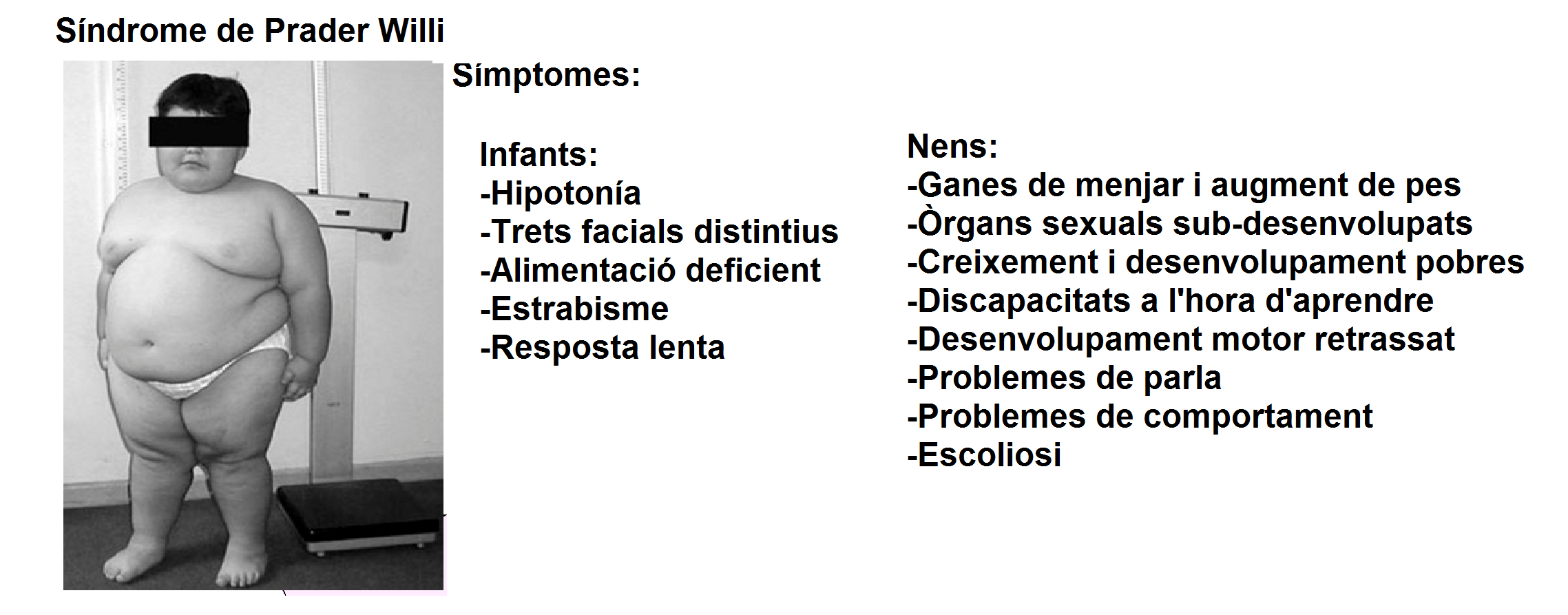 Sñindrome de Prader willi, foto del noi de Wikimedia Commons